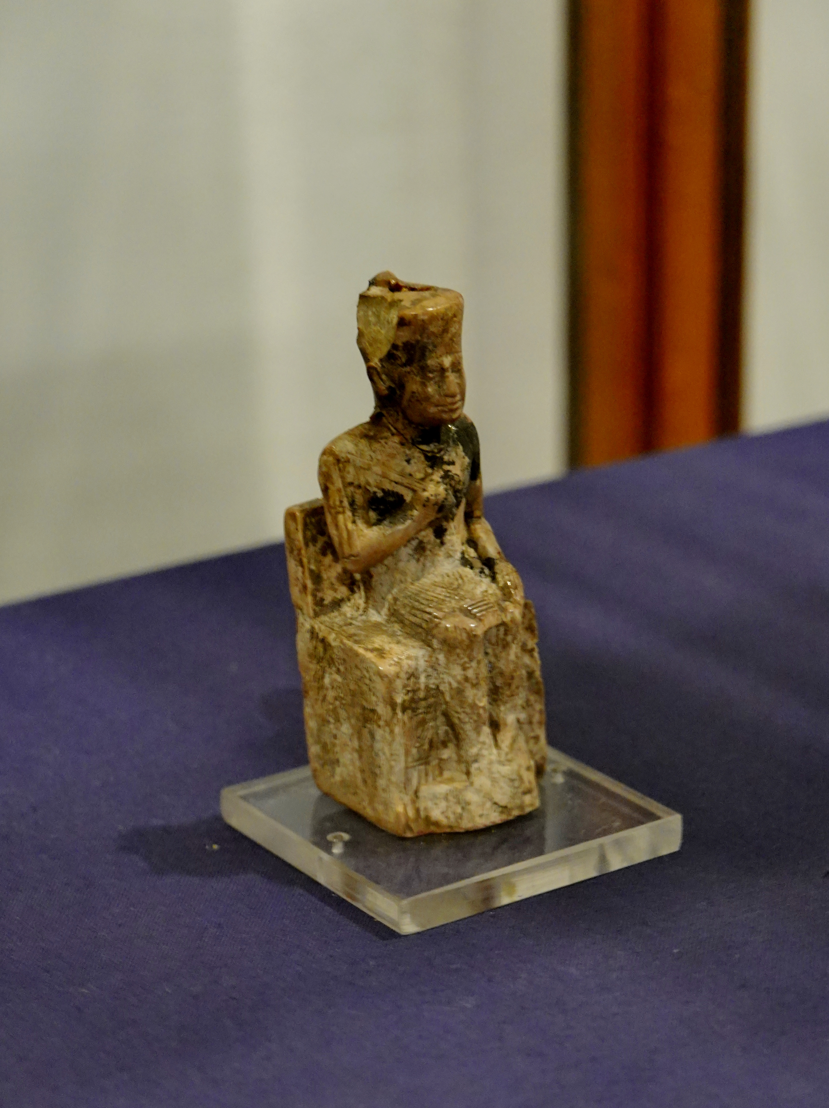 Statuette des sitzenden Königs Cheops der 4. altägyptischen Dynastie (Höhe: 7,5 cm, Breite: 2,5 cm, Tiefe: 2,9 cm), gefunden 1903 in Abydos, ausgestellt im Ägyptischen Museum in Kairo, Ägypten